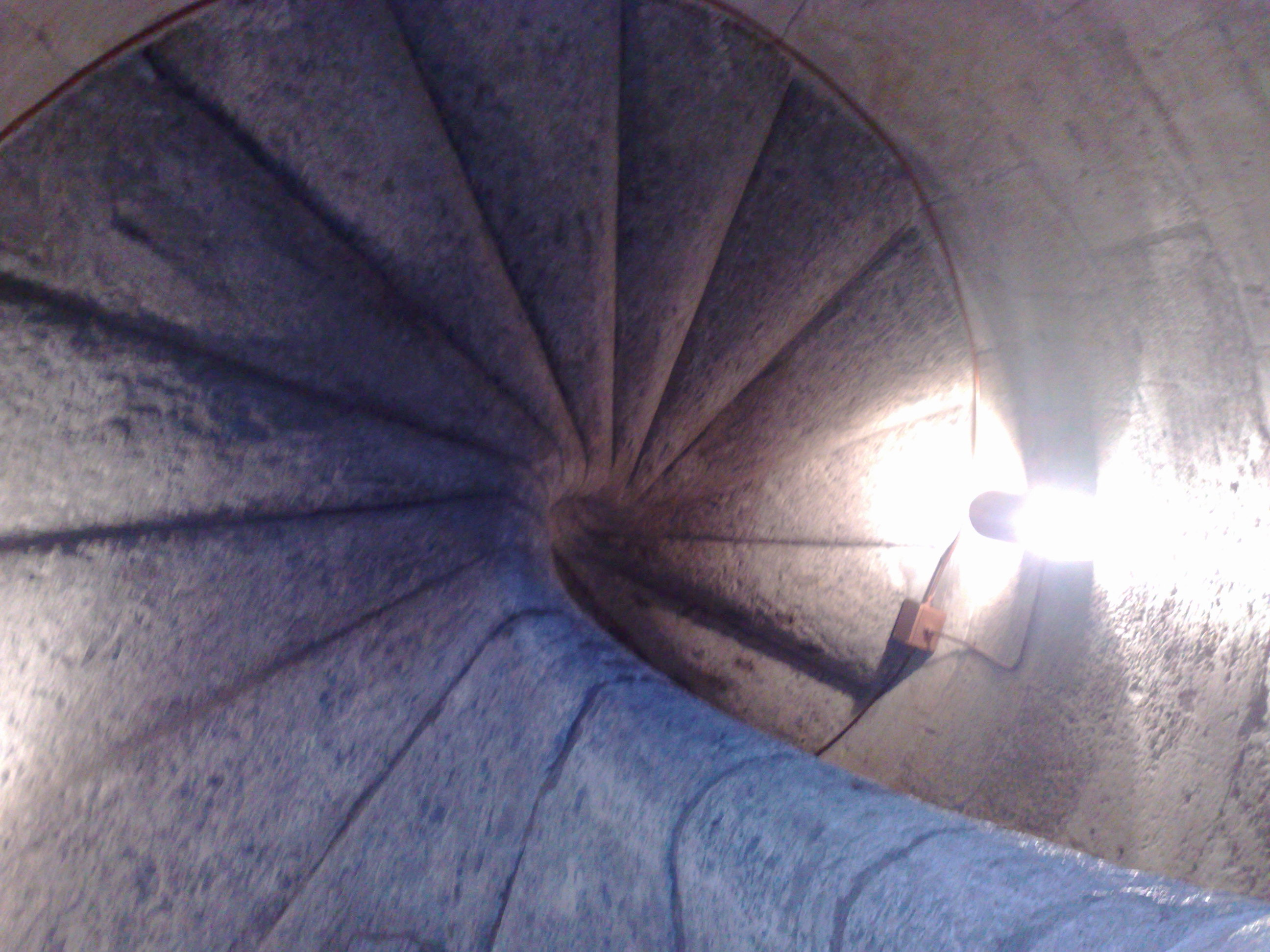 Scala Catalana che consentiva di salire sopra le torri del Maschio Angioino. Qui mi trovo dentro la Torre del Beverello.